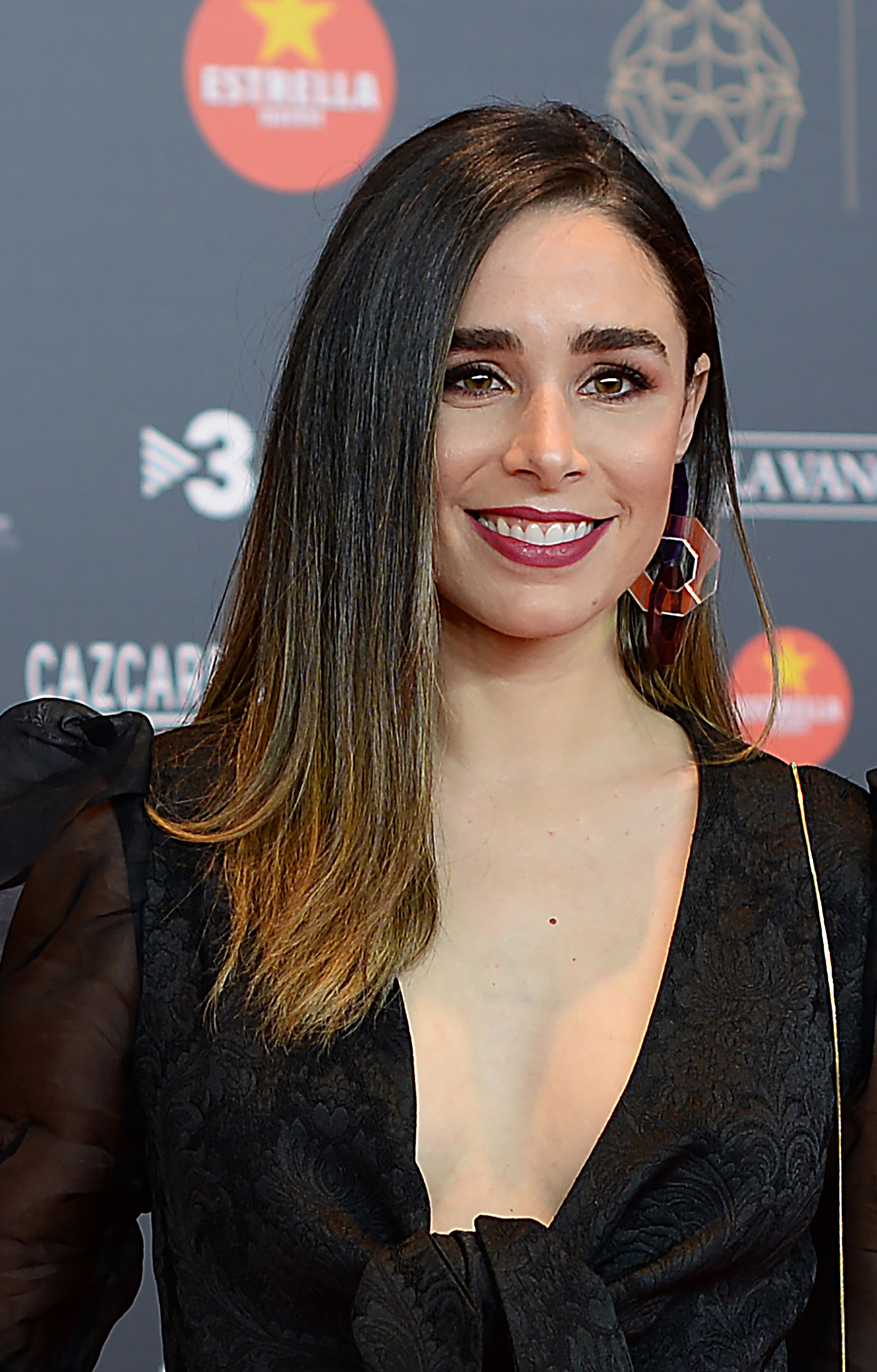 Candela Serrat, actriu, XII Premis Gaudí (2020)